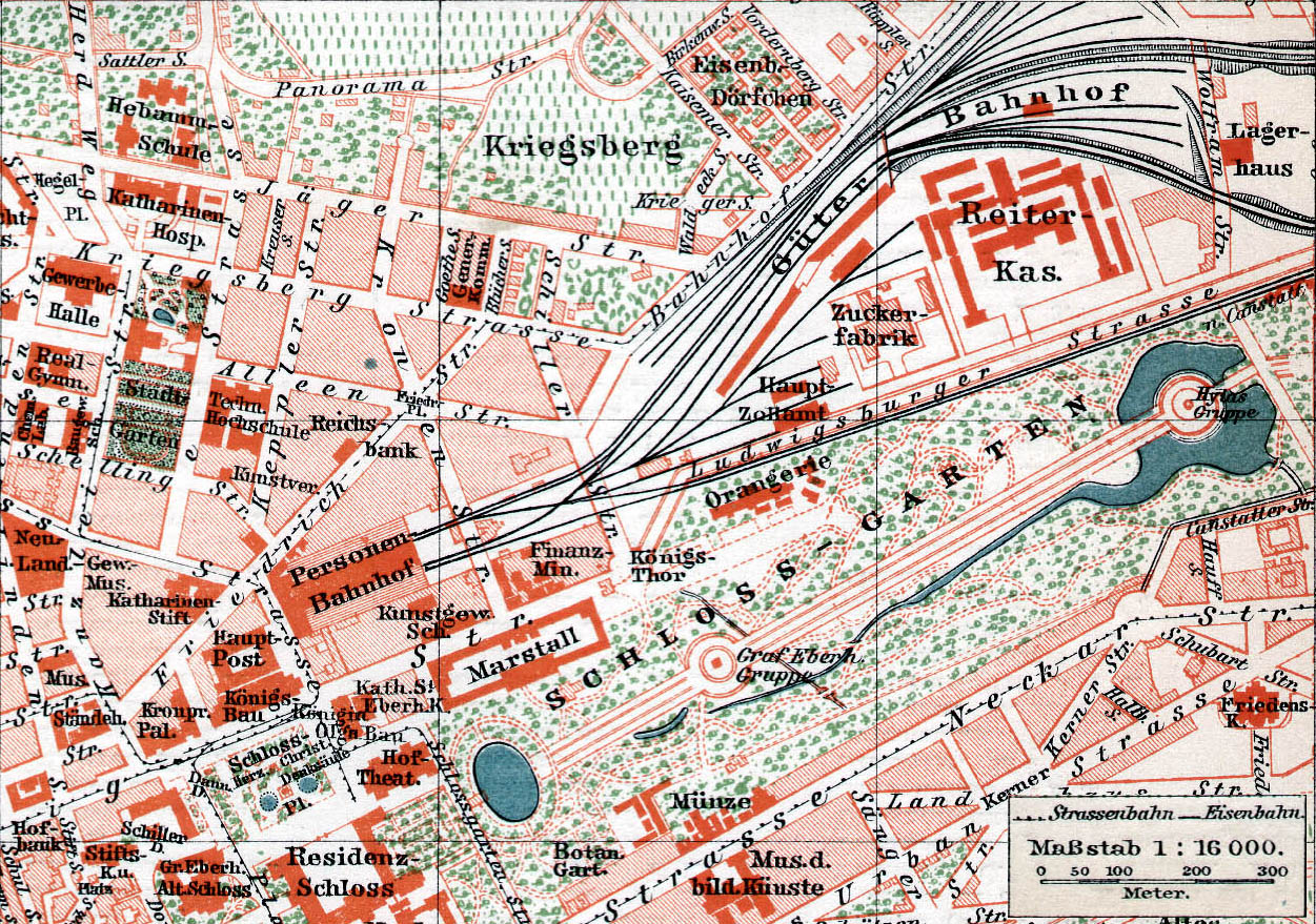 Ausschnitt des Güterbahnhofs aus Stuttgart, Stadtplan, 1896.